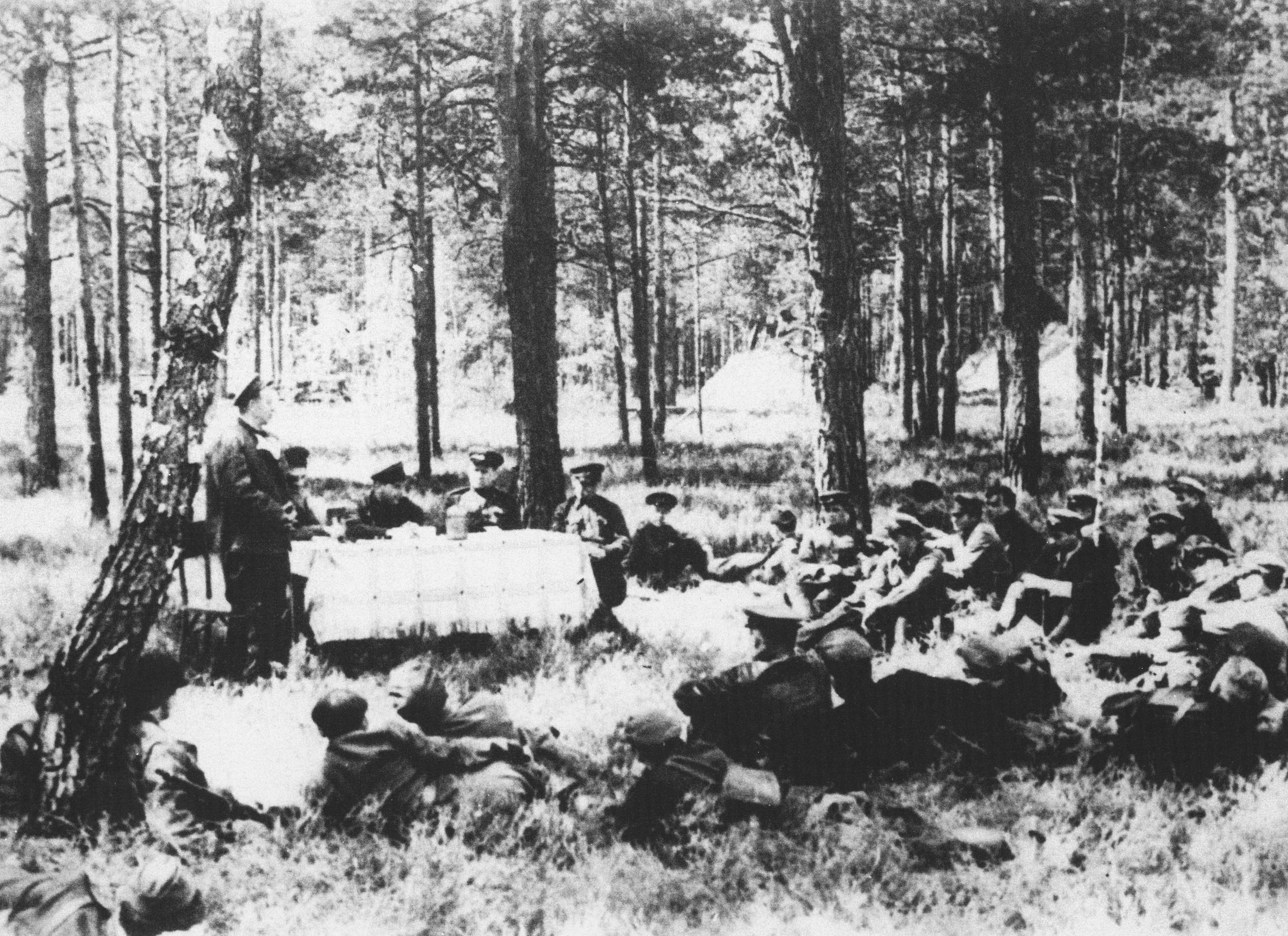 Д. Коротченко выступает на совещании командного состава Житомирского соединения партизанских отрядов под командованием С. Маликова.